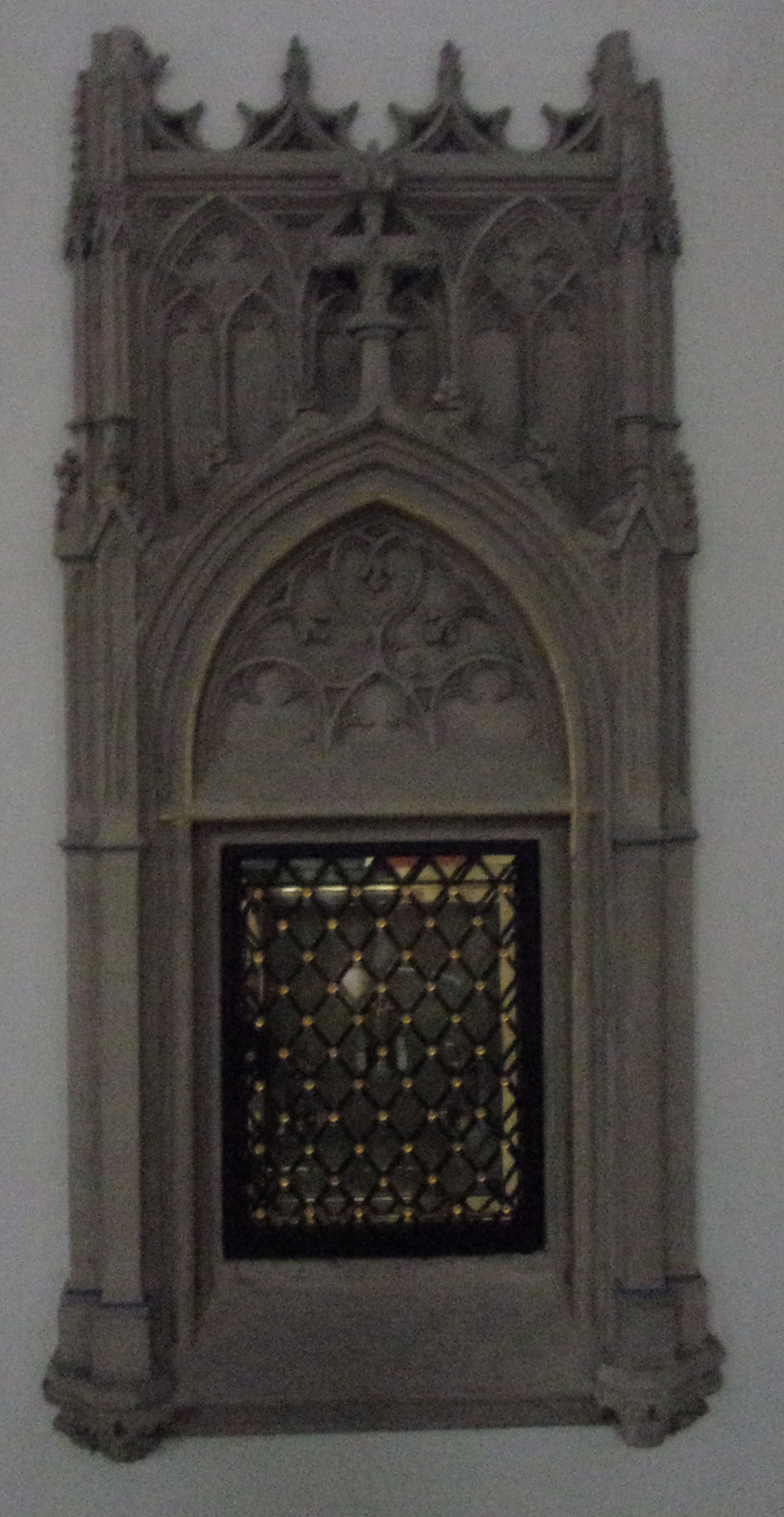 Sakramentshäuschen